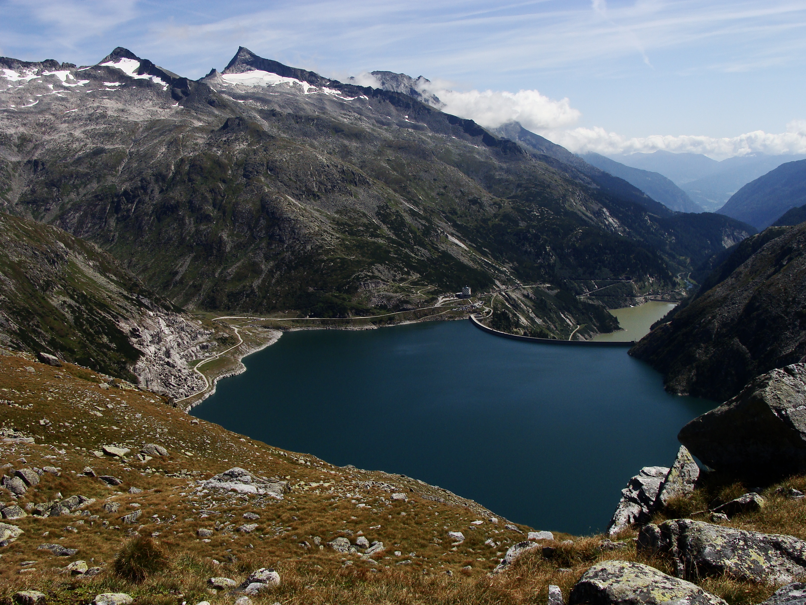 Hafner mit Kölnbreinspeicher